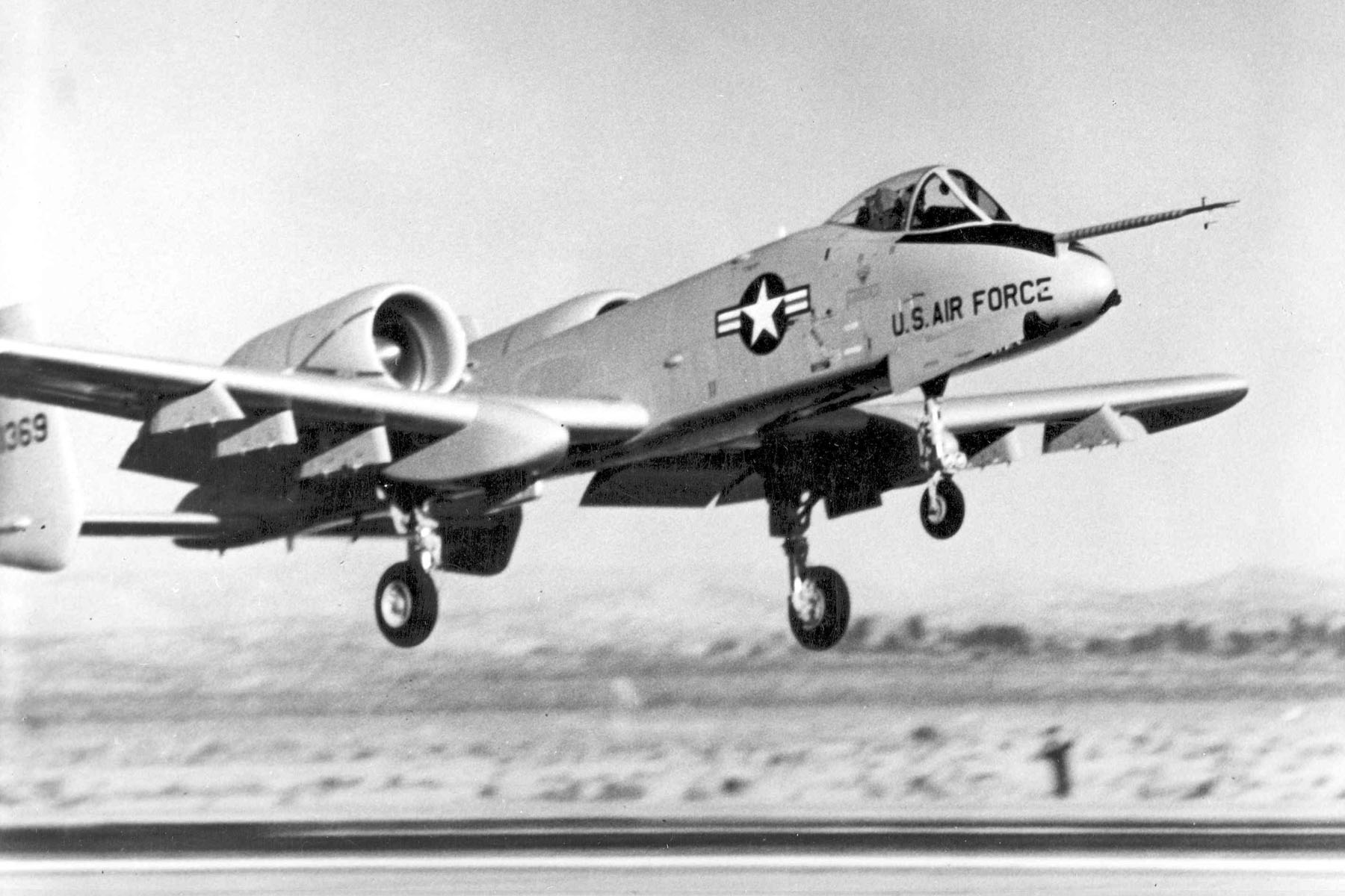 YA-10A